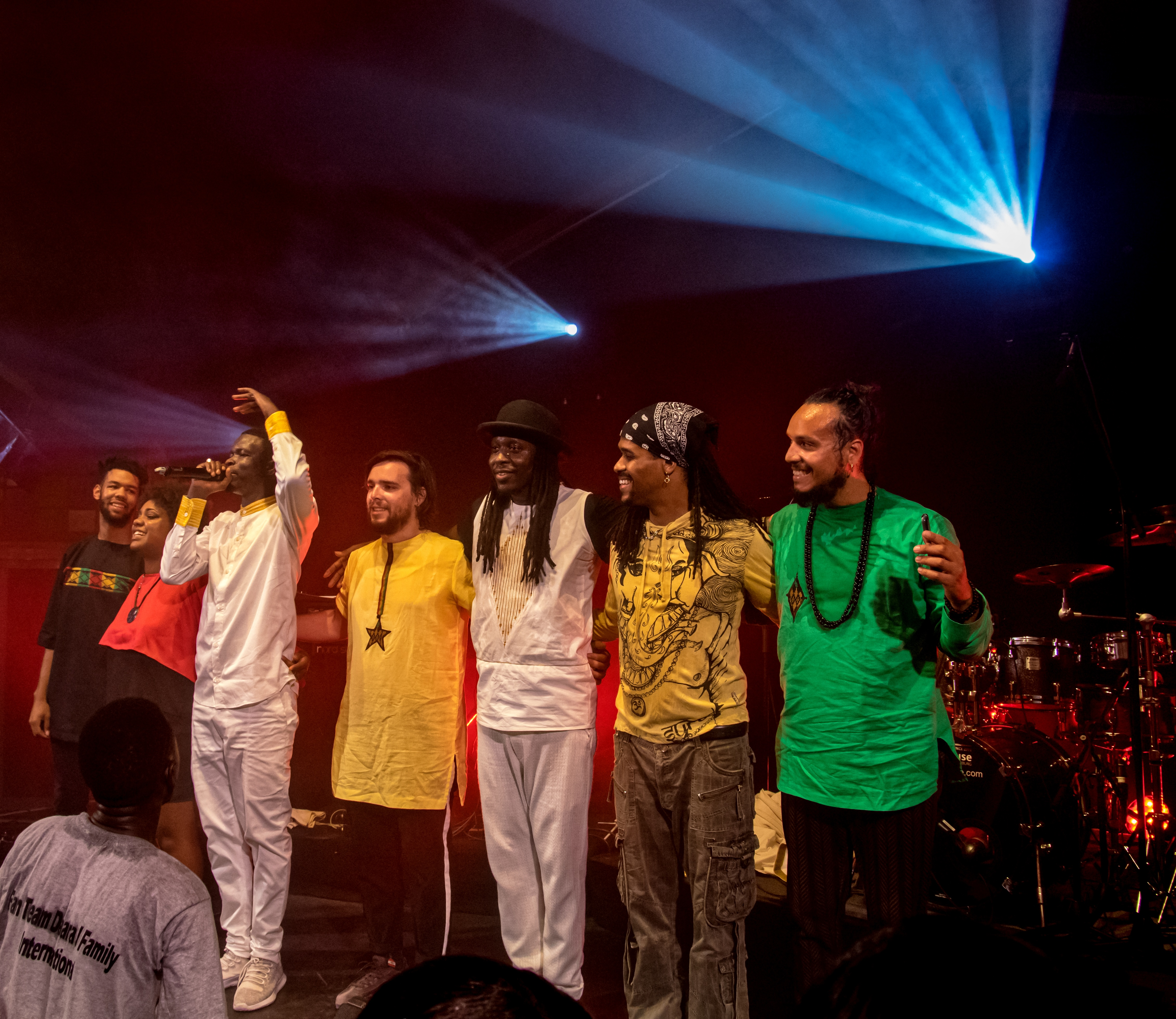 Bilder vom Zelt Musik Festival 2018 in Freiburg im Breisgau Daara J am 29.07.2018 im Spiegelzelt